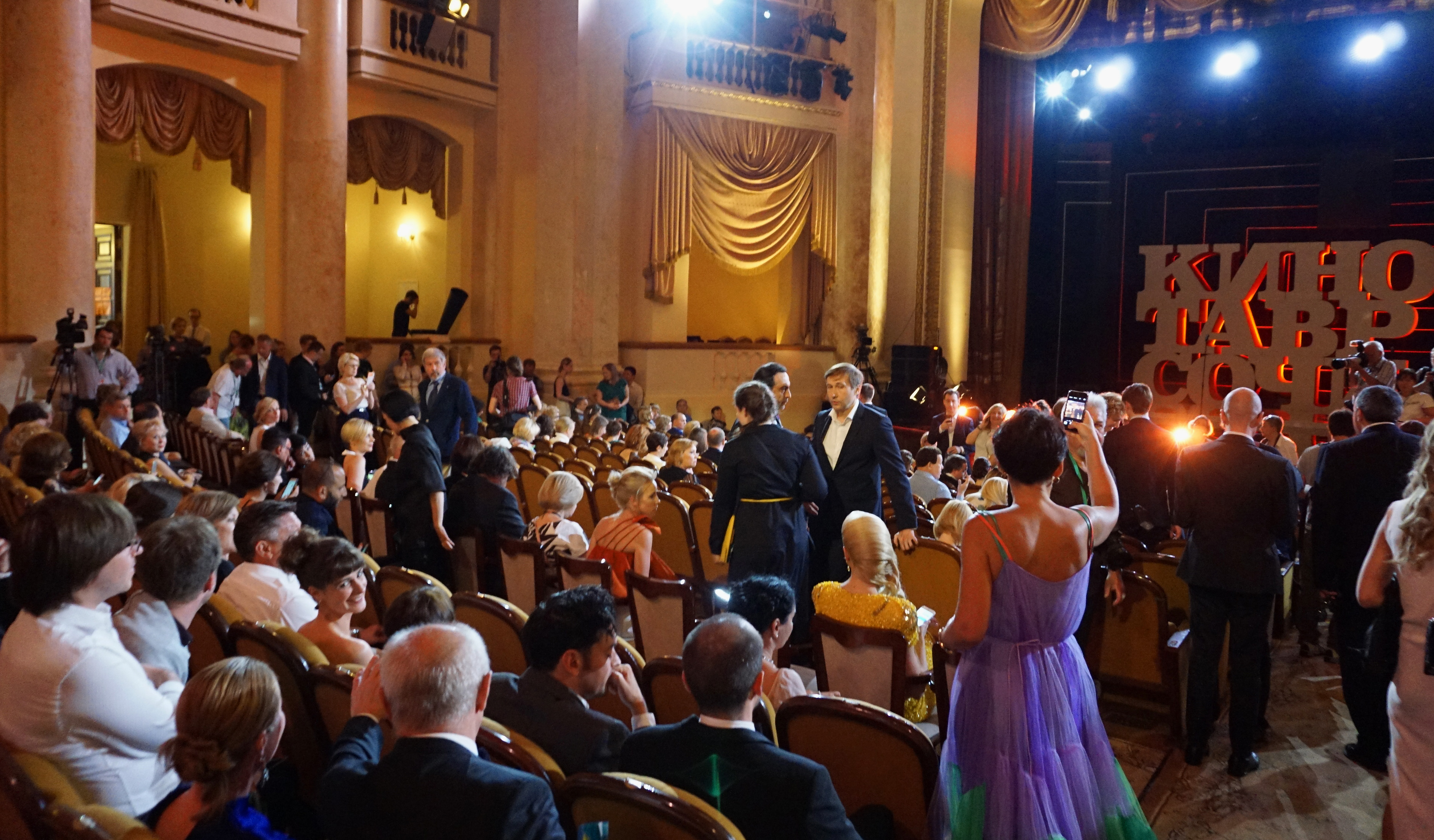 "Кинотавр - 2016". Церемония закрытия и награждения в Зимнем театре Сочи.